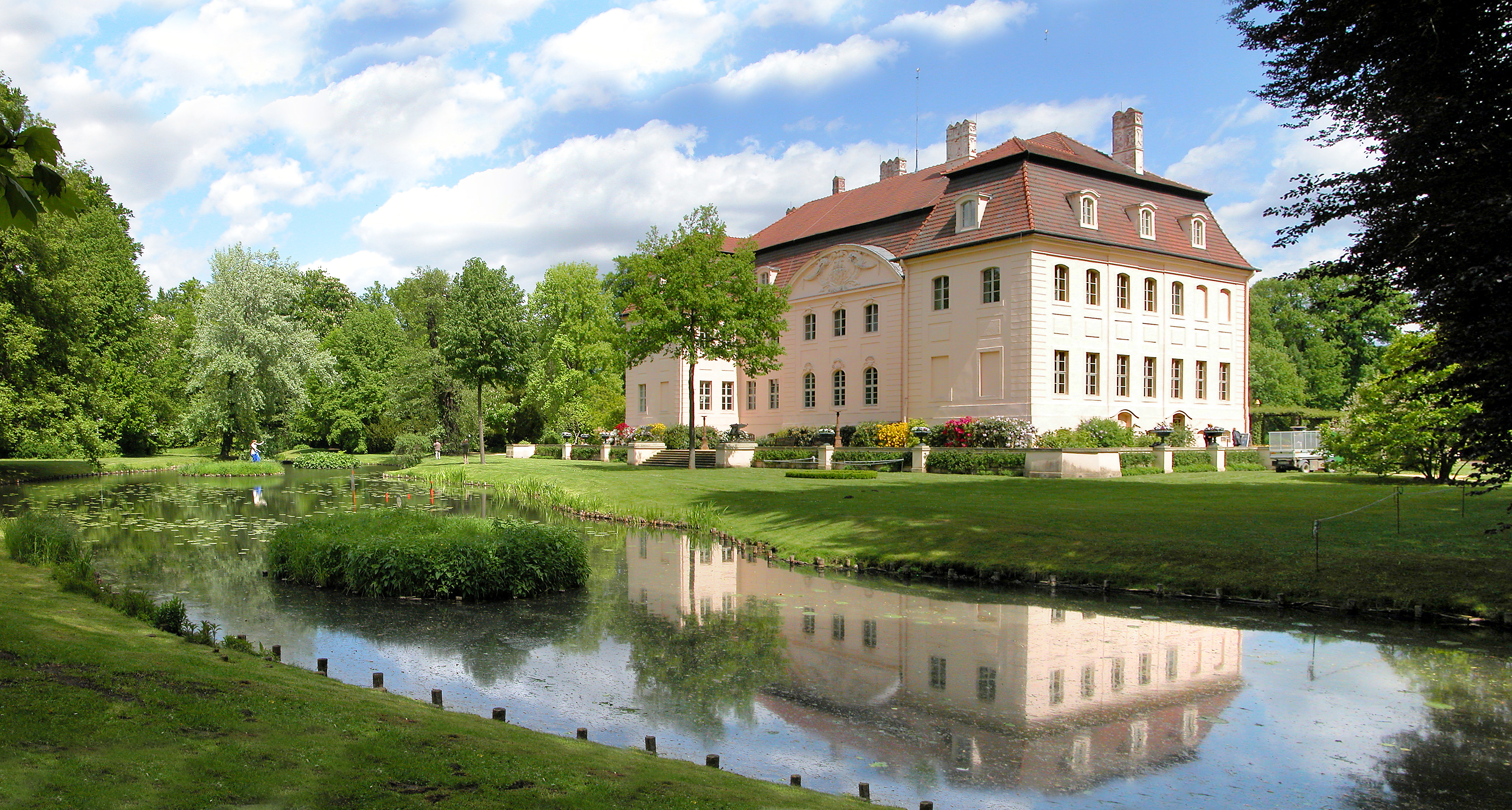 13.05.2015 03042 Branitz (zu Cottbus): Fürst-Pückler-Park Branitz. Schoß von SüdwestenDie Herrschaft Branitz gelangte 1696 in den Besitz der Grafenfamilie Pückler. 1846 bis 1871 legte Hermann Fürst Pückler-Muskau den Landschaftspark an. Das Schloß Branitz wurde 1772 nach Entwurf von Gottfried Semper errichtet. 1850 erfolgte ein Umbau. 1945 enteignet. In der DDR Bezirksmuseum. Die museale Nutzung blieb bis heute erhalten. Seit 1995 wird der Innenpark mit Pleasureground und Schloß von der kommunalen Stiftung Fürst-Pückler-Museum Park und Schloß Branitz verwaltet und gepflegt. [DSCN5632+5633.JPG]20150513365MDR.JPG(c)Blobelt